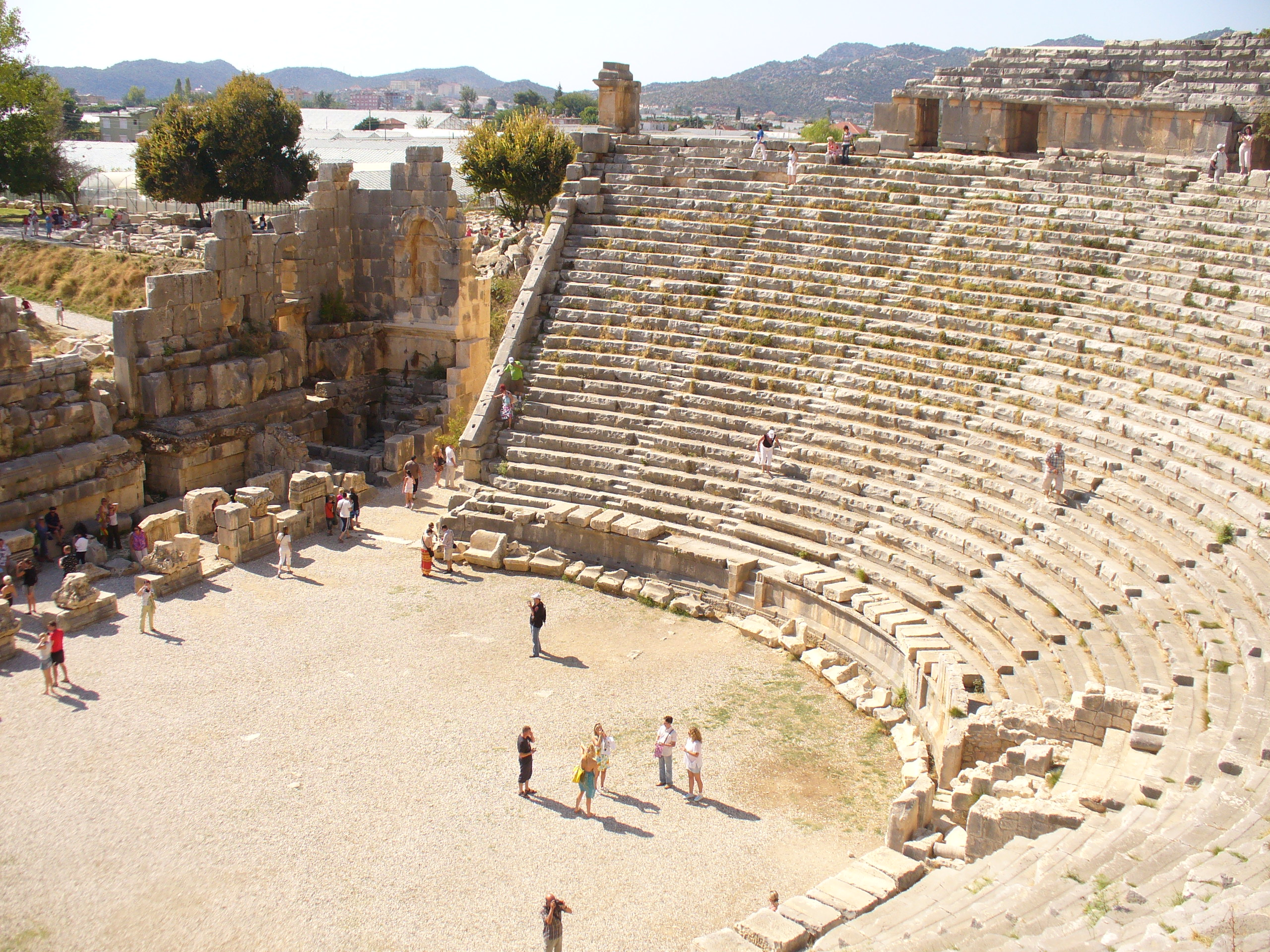 Le magnifique théâtre de Myra en Lycie.